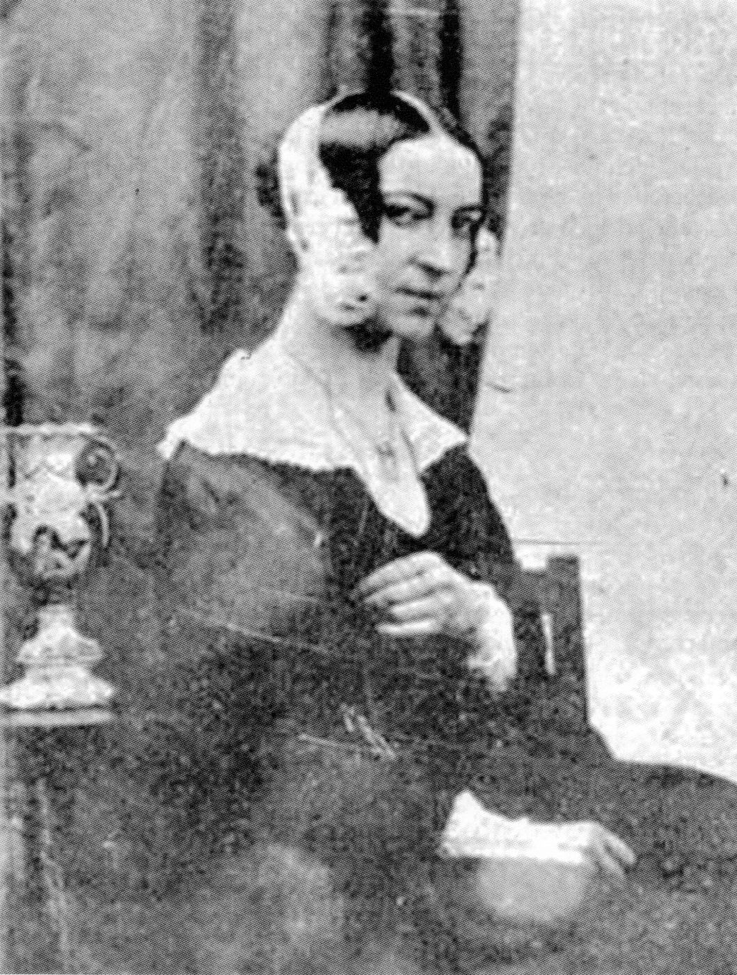 Therese Staufenau geb. Gauß, Daguerreotypie von Philipp Petri (1800–1887) , etwa 1850. Siehe auch: File:Therese Staufenau geb. Gauß, 005.jpg und File:Therese Staufenau geb. Gauß, 007.jpg.